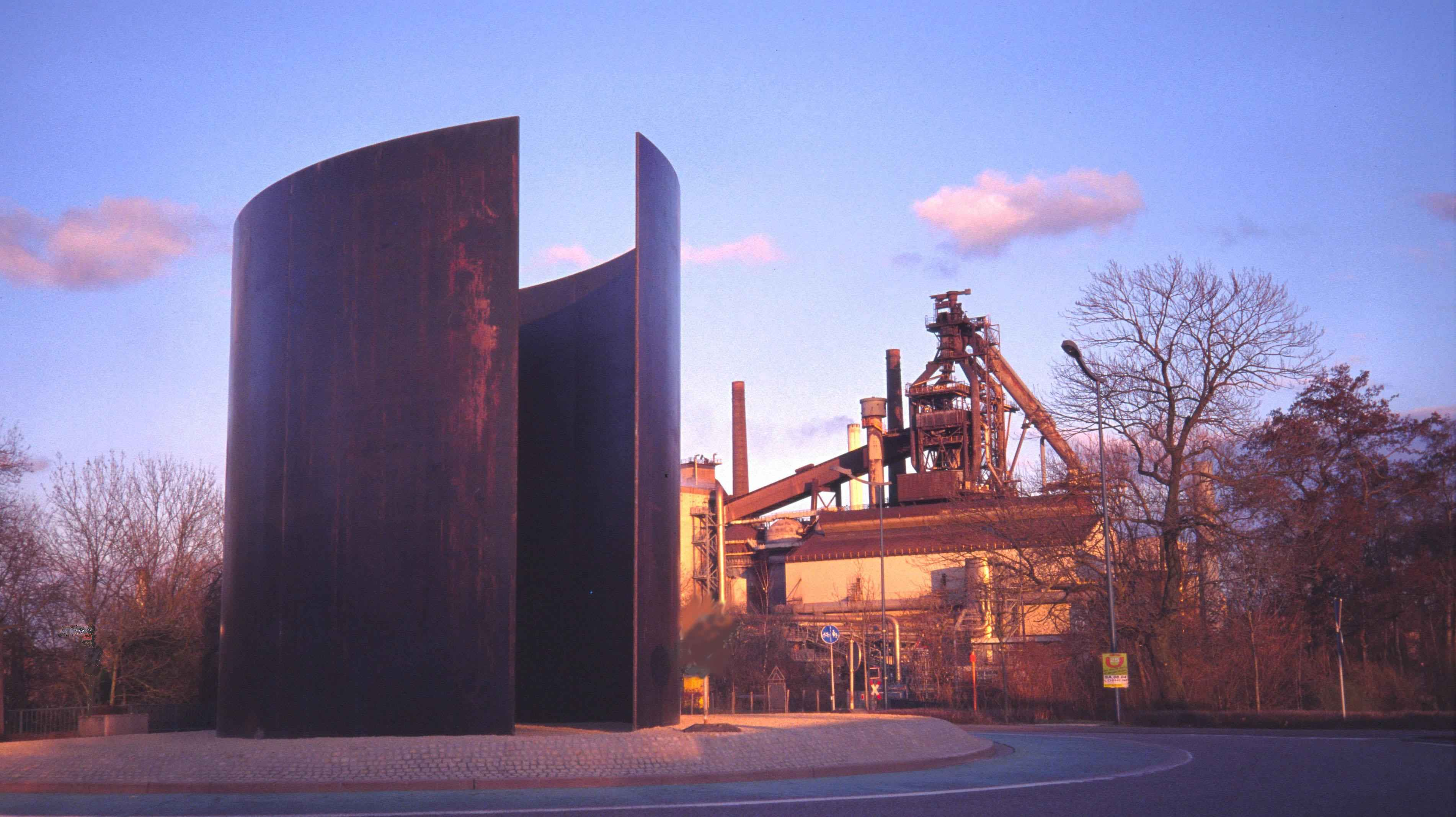 Richard Serra: "View Point" Skulptur in Dillingen/Saar Bild selbst erstellt 25.März 2006 Karl Bodinet